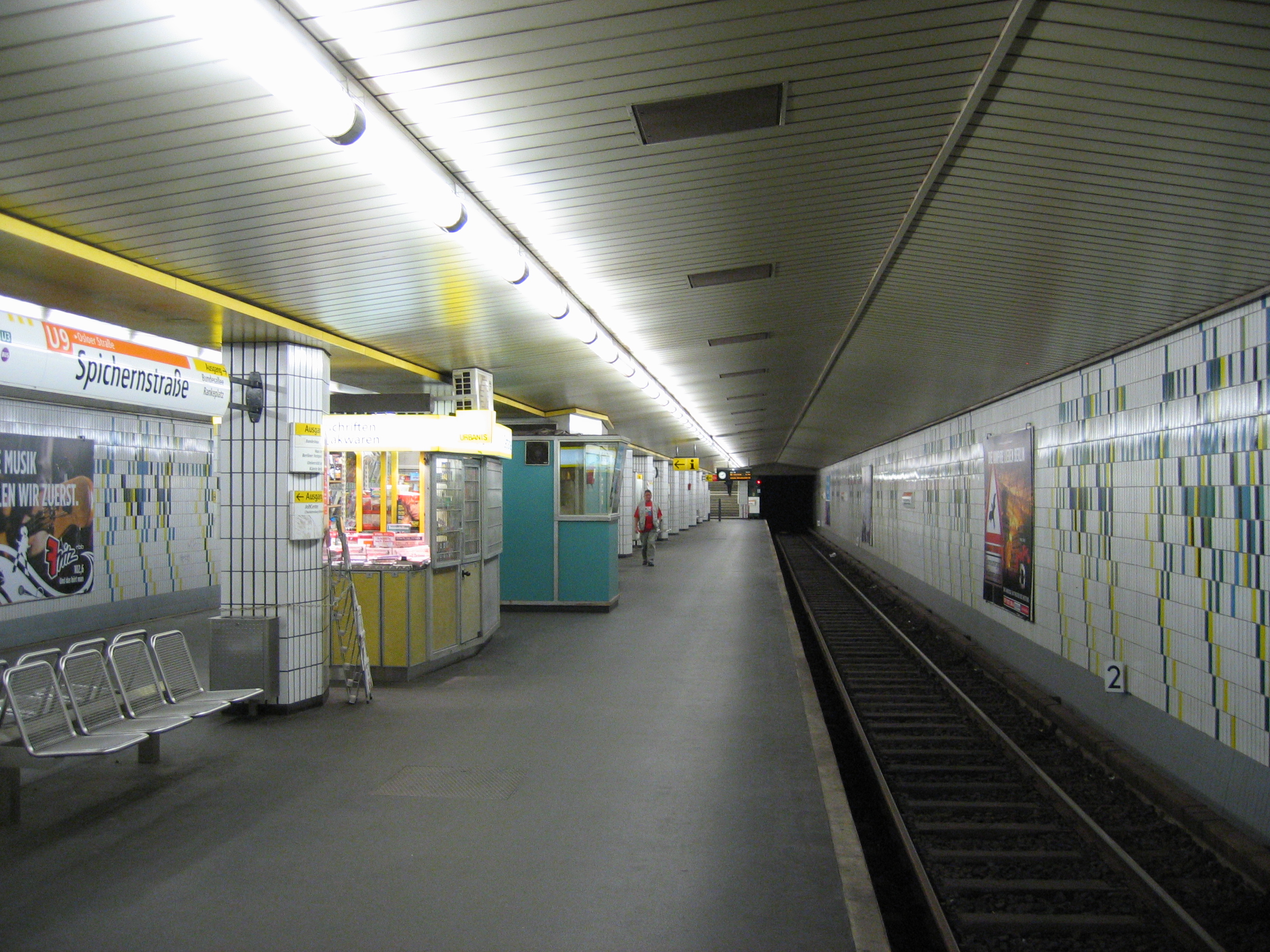 U-Bahnhof Spichernstraße (U9), Berlin